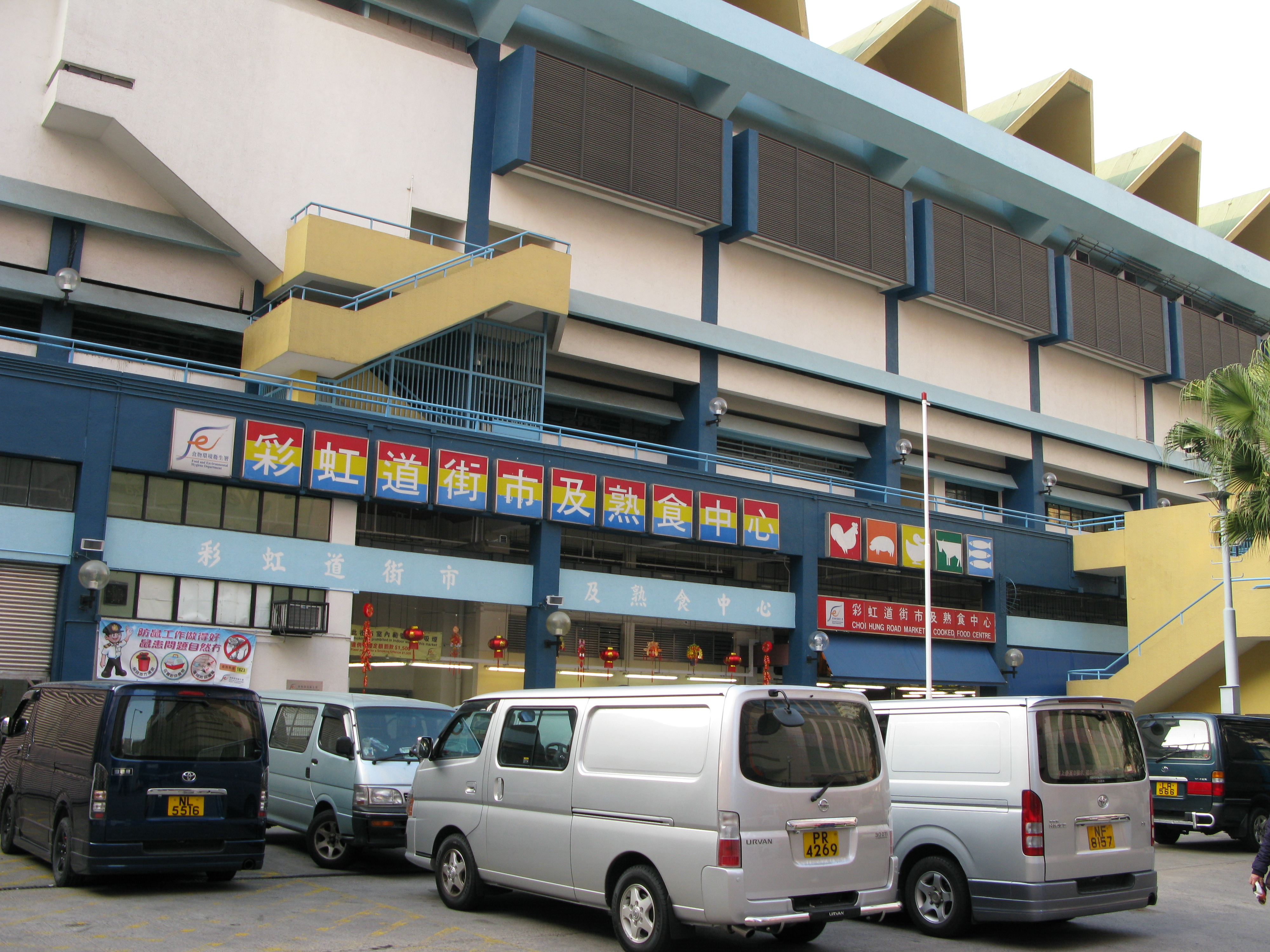 中文（香港）: 香港新蒲崗雙喜街彩虹道街市及熟食中心